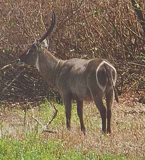 Ellipsen-Wasserbock